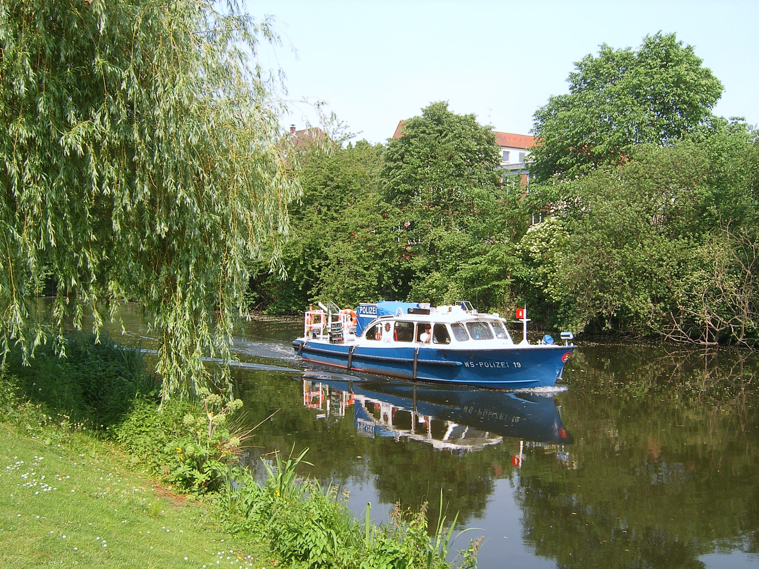 Bildbeschreibung: Hamburg-Barmbek, Osterbekkanal, Boot 19 der Wasserschutzpolizei der Polizei der Freien und Hansestadt Hamburg Fotograf: selbst Datum: 14.6.2006